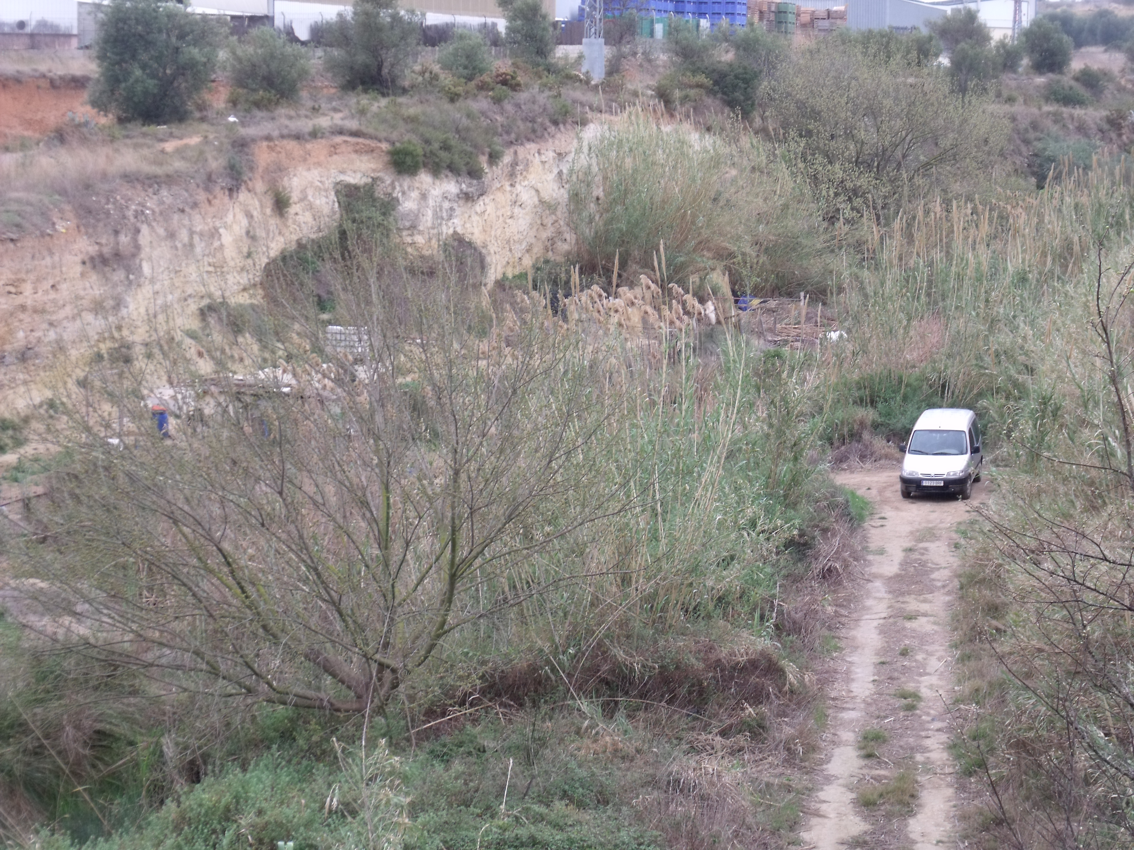 Barranc de Picassent.